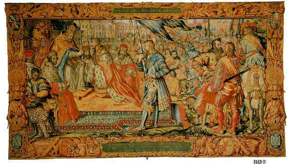 Kaiser Friedrich Barbarossa überreicht am 16. September 1180 Pfalzgraf Otto von Wittelsbach das Herzog-Schwert.